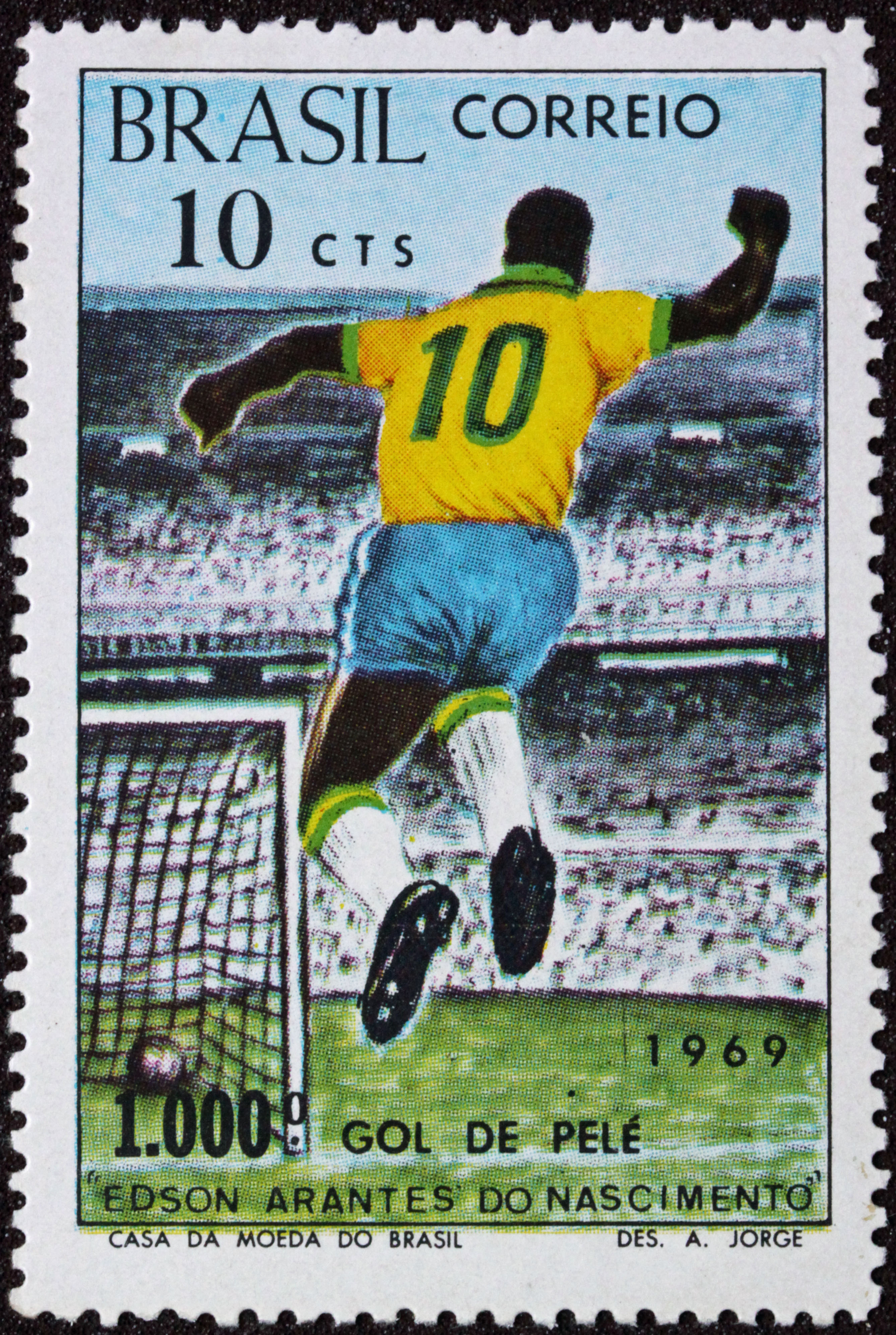 Selo comemorativo do milésimo gol de Pelé (Edson Arantes do Nascimento) em 1969.